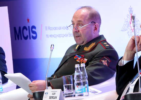 начальник Главного разведывательного управления Генштаба (ГРУ ГШ) генерал-лейтенант Игорь Сергун на III Московской конференции по международной безопасности